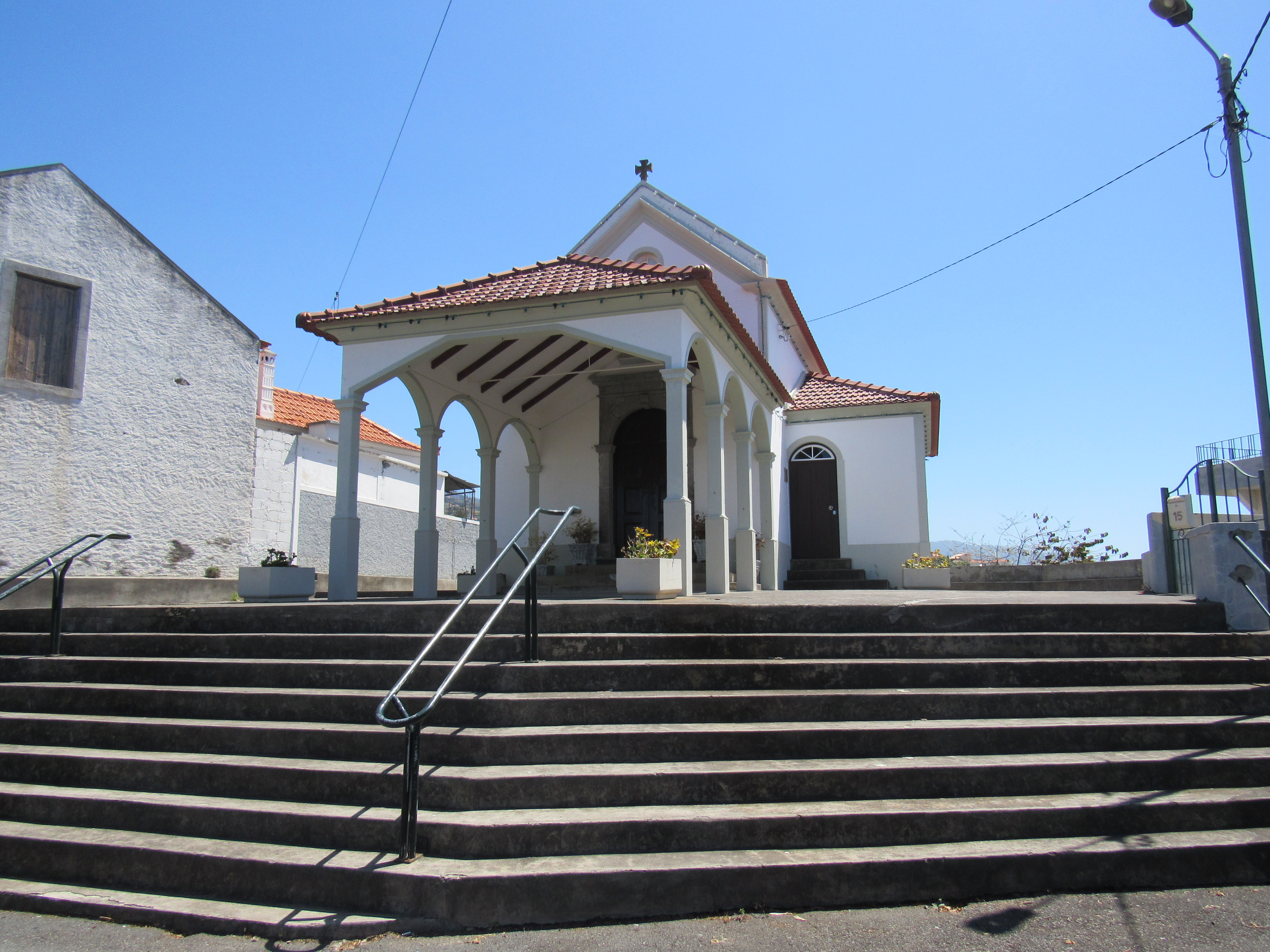 Capela de Nossa Senhora do Livramento localiza-se no sítio do Livramento - Ponta do Sol